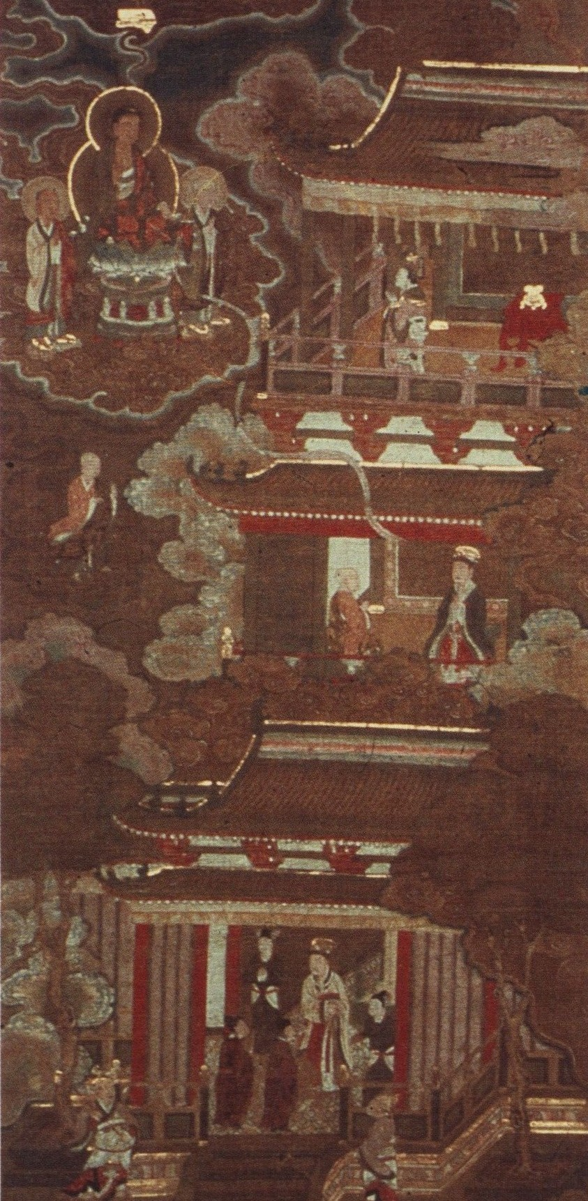 "관무량수경"이 설하여진 동기를 적은 서분의 내용을 도상화한 고려시대의 불화.